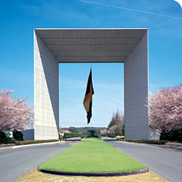 名古屋商科大学の正門